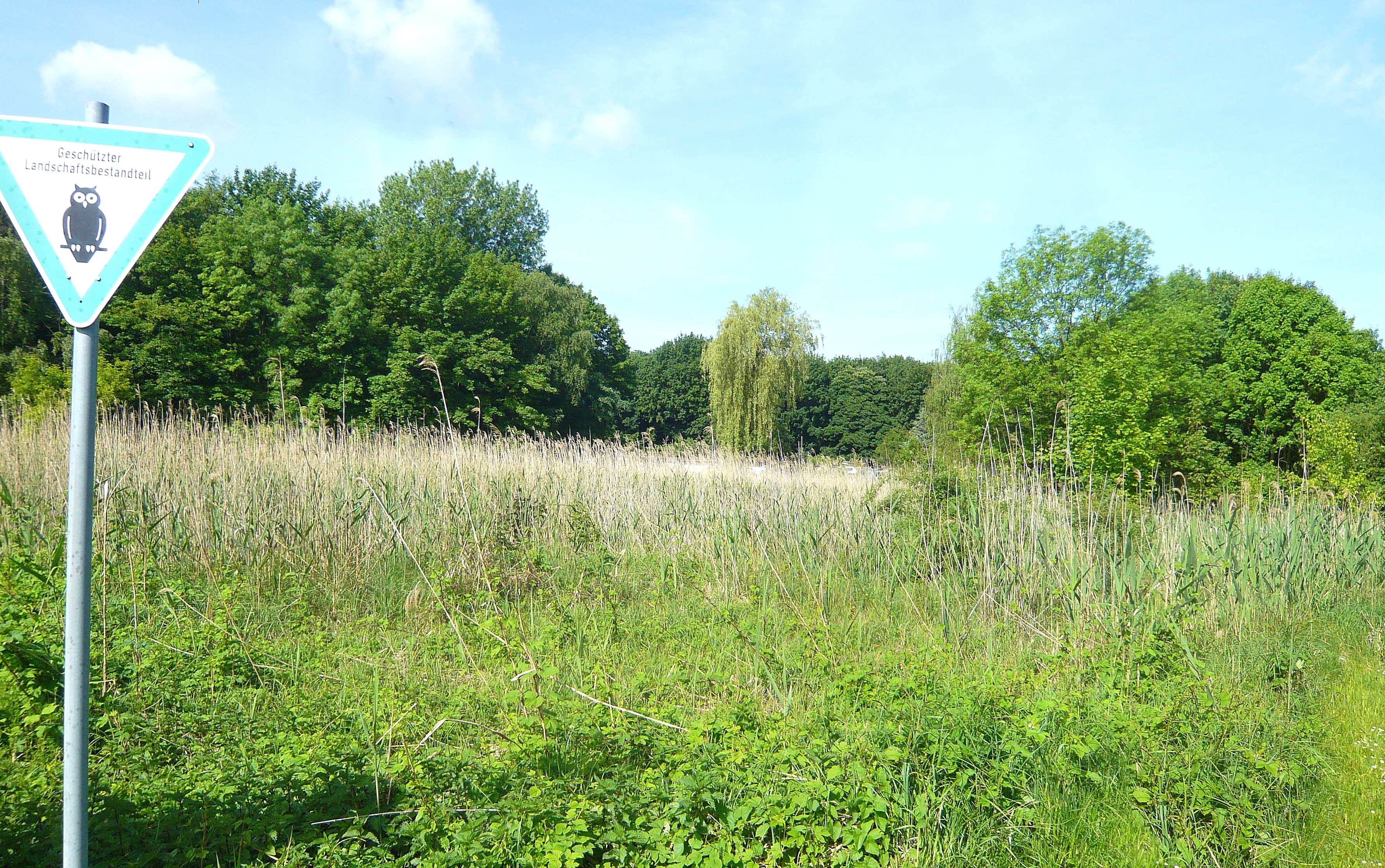 Weißensee, Teiche zwischen Liebermann- und Hansastraße